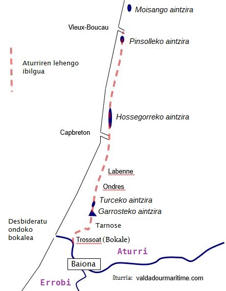 Aturri ibaiaren 1578 arteko ibilgua eta egungoa Baionatik itsasora